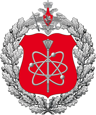 Эмблема 12-го Главного управления Минобороны России